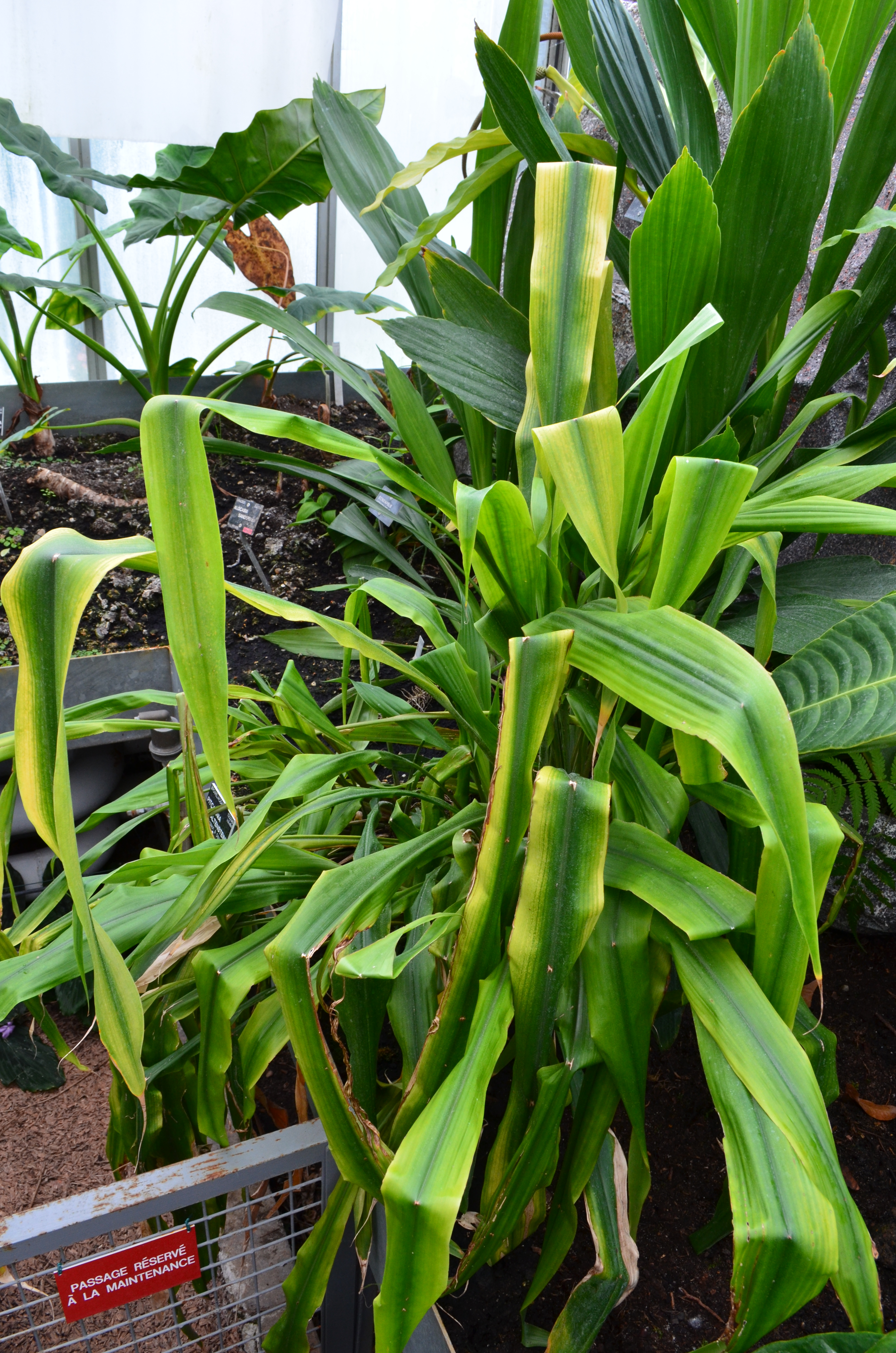 Spécimen de Pitcairnia altensteinii, cultivé dans les serres du jardin botanique de Lyon au parc de la Tête-d'Or